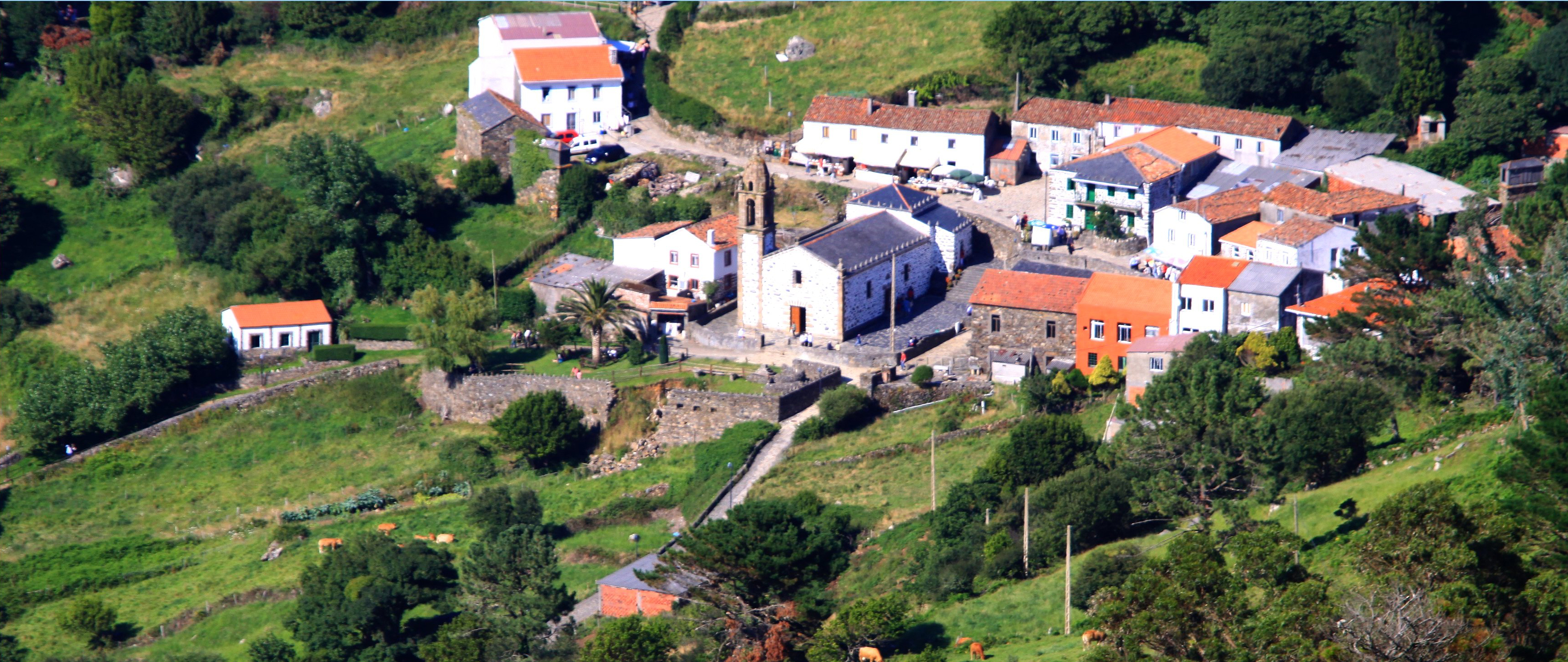 Santo André de Teixido, Cedeira. Panorámica Santo André de Teixido é unha aldea localizada na parroquia de Régoa, ó leste do concello de Cedeira, na Serra da Capelada. Galiza